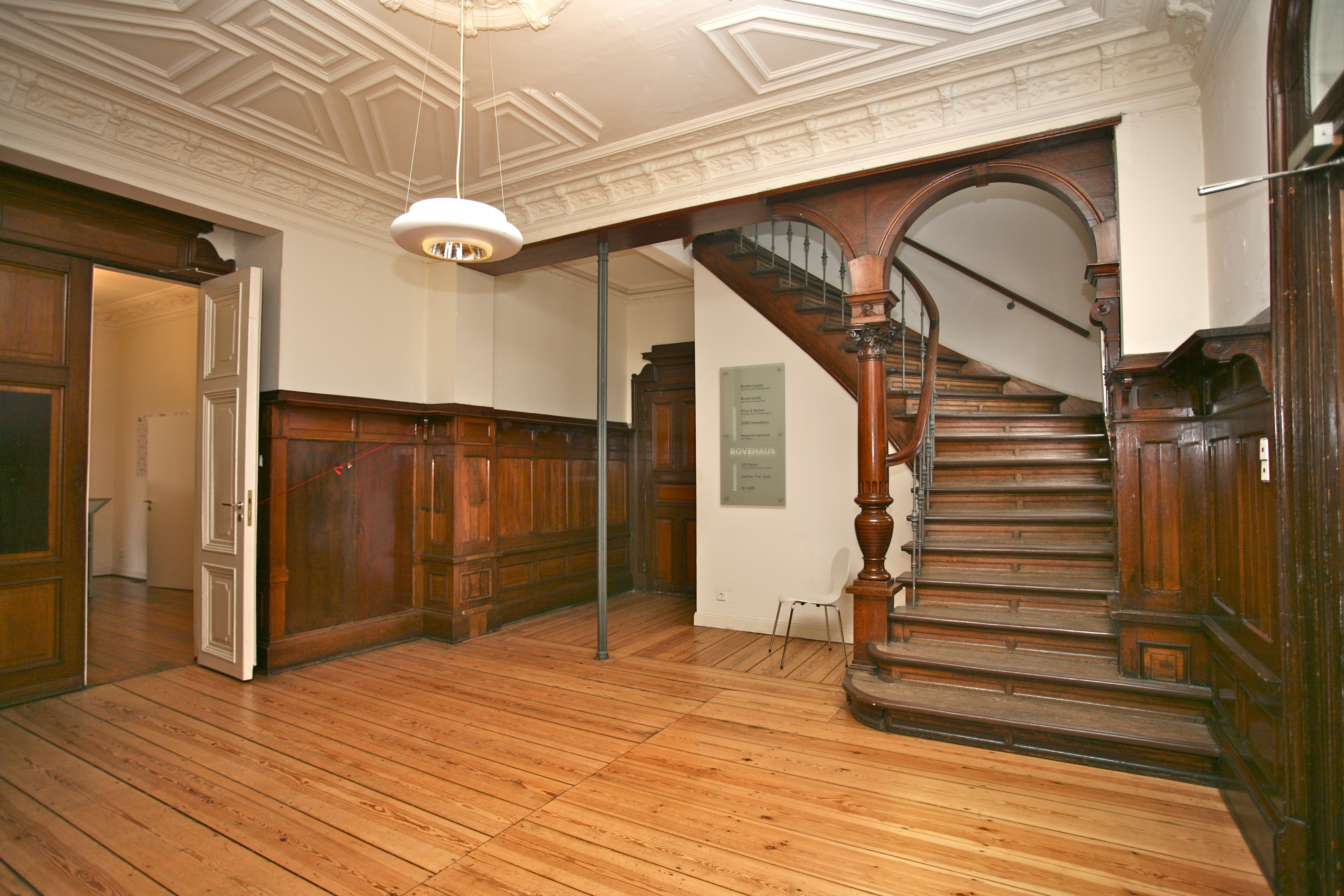 Bovehaus Hamburg-Wandsbek, Treppenhaus, Bildspende von Architekturbüro Bernd Lietzke